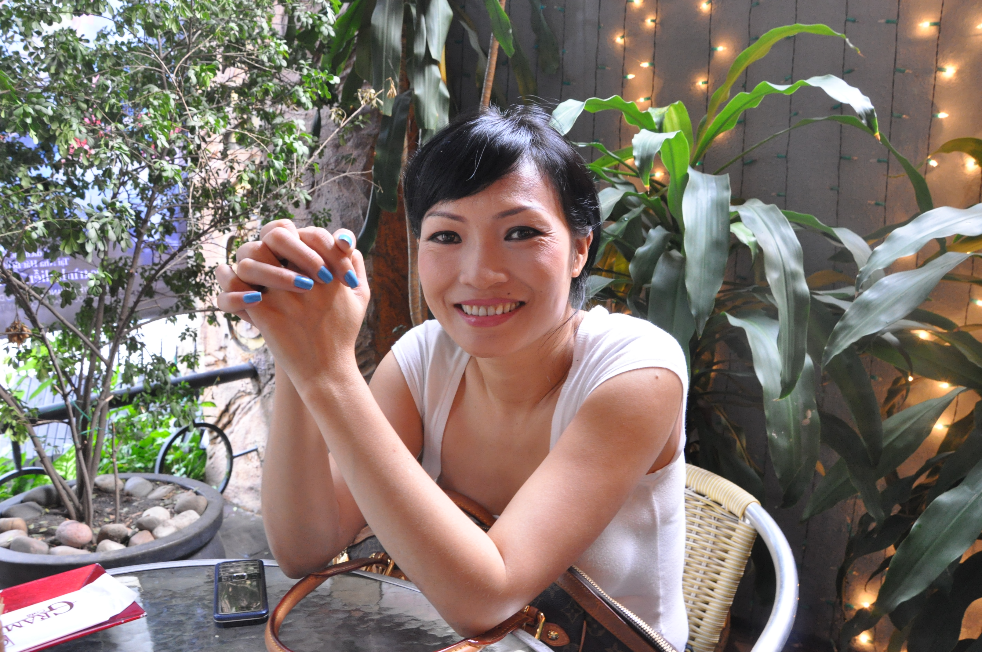 Ca sĩ Phương Thanh trong một buổi phỏng vấn tại cafe Grammy, nơi được xem như "ngôi nhà thứ 2" của chị